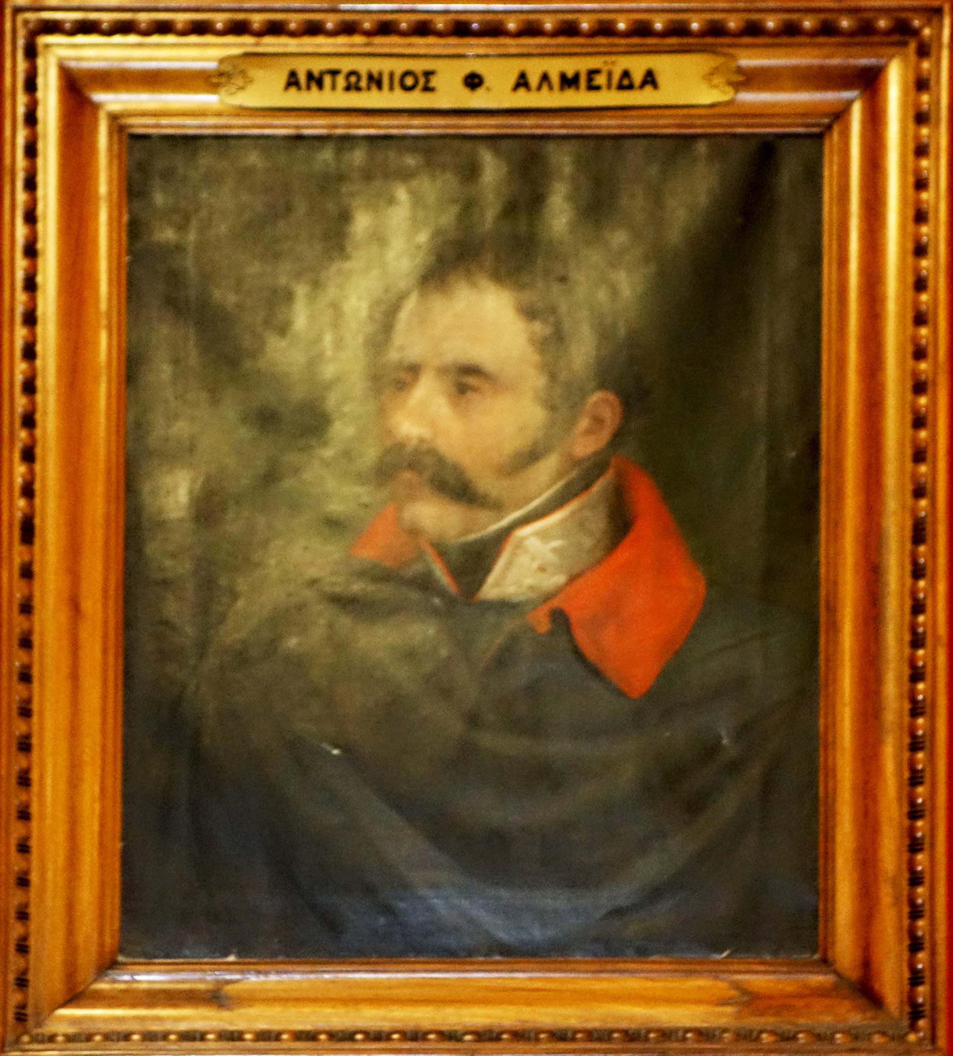 Πίνακας του Φιλέλληνα Αντόνιο Αλμέιντα. Από την μόνιμη έκθεση του Εθνικού και Ιστορικού Μουσείου.